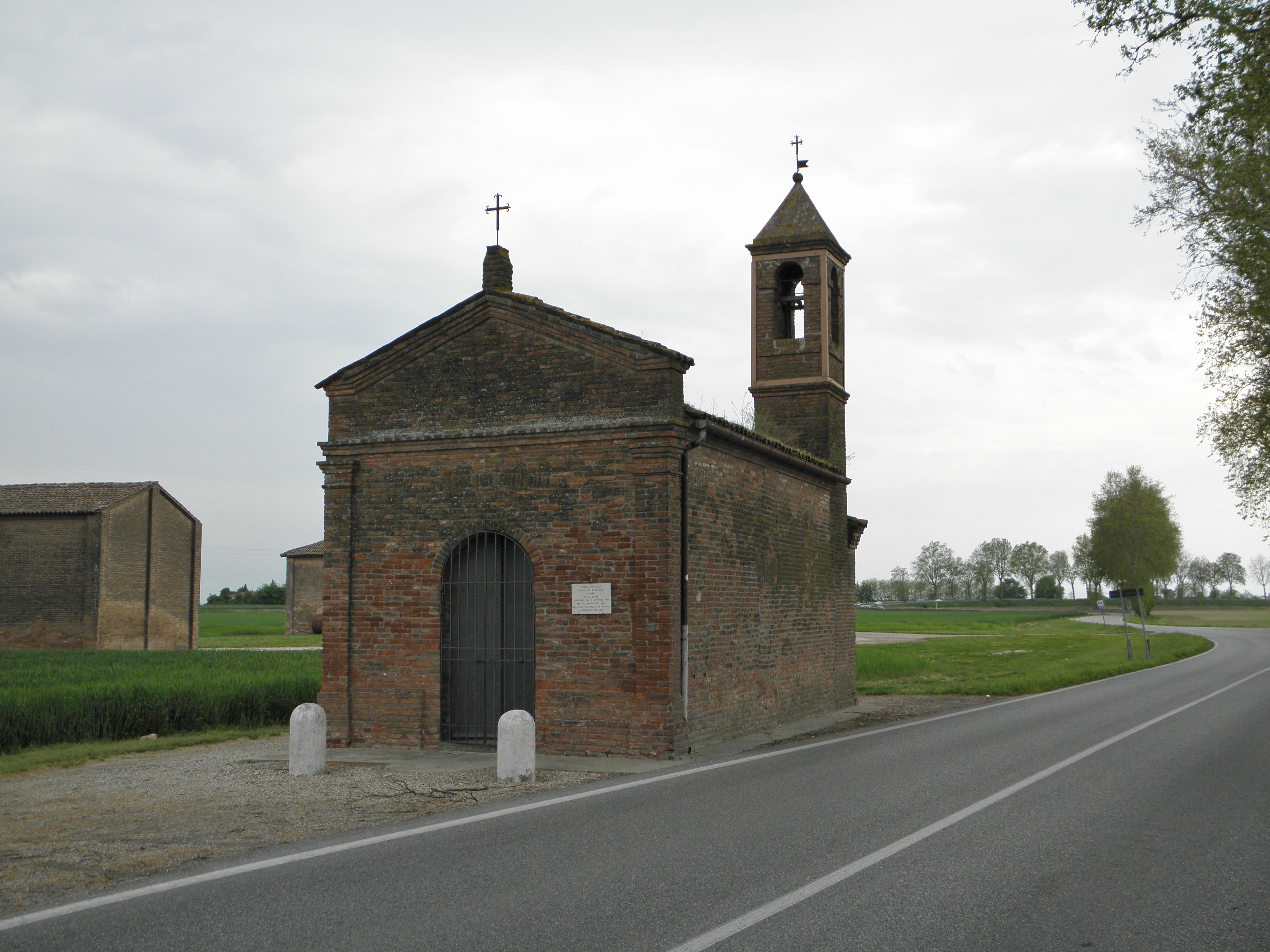 Ponte Rodoni, frazione di Bondeno: l'oratorio del Marzaiolo.